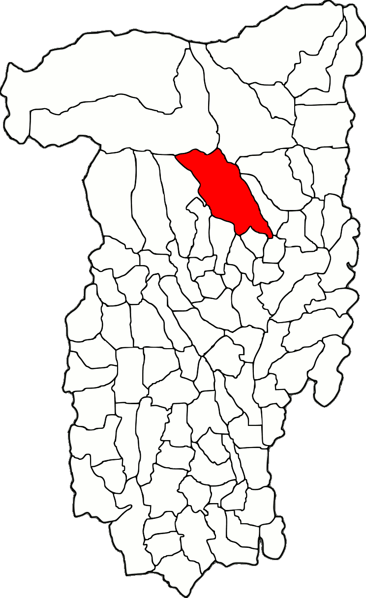 Lage der Stadt Băile Olănești im Kreis Vâlcea (RO).